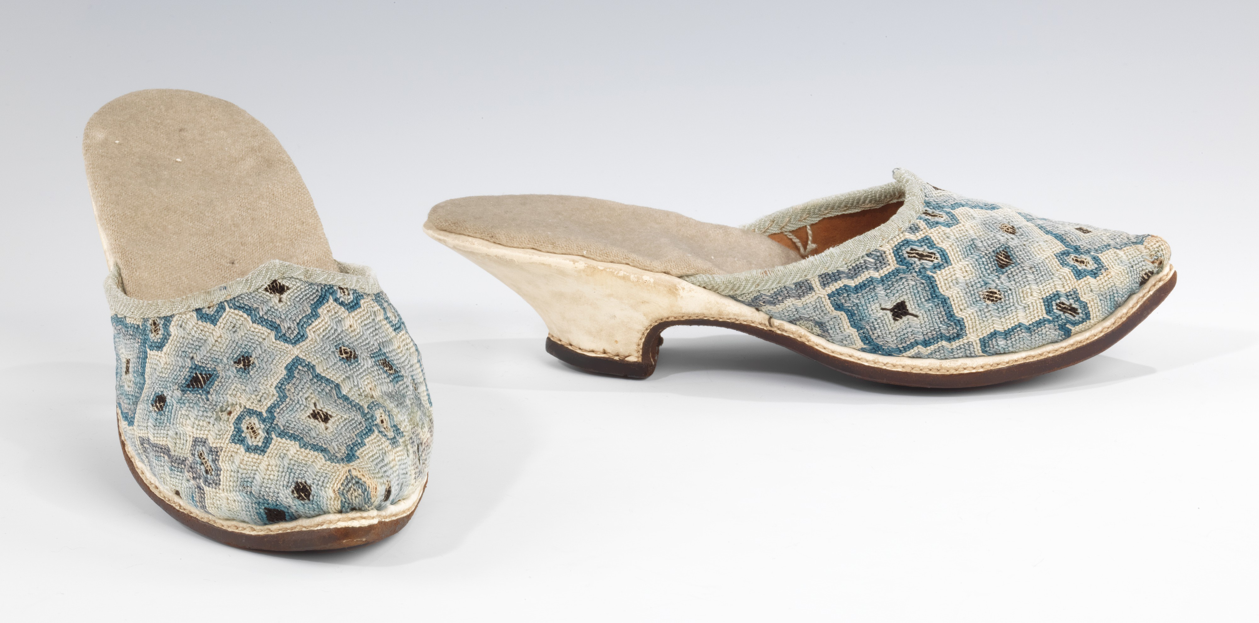 European; Mules